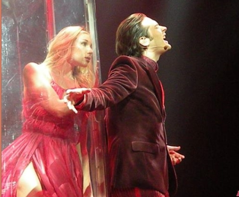 Julien Loko dans le personnage de Jonathan Harker, dans la comédie musicale Dracula, l'amour plus fort que la mort. Credit photographie Félineda Farfelue